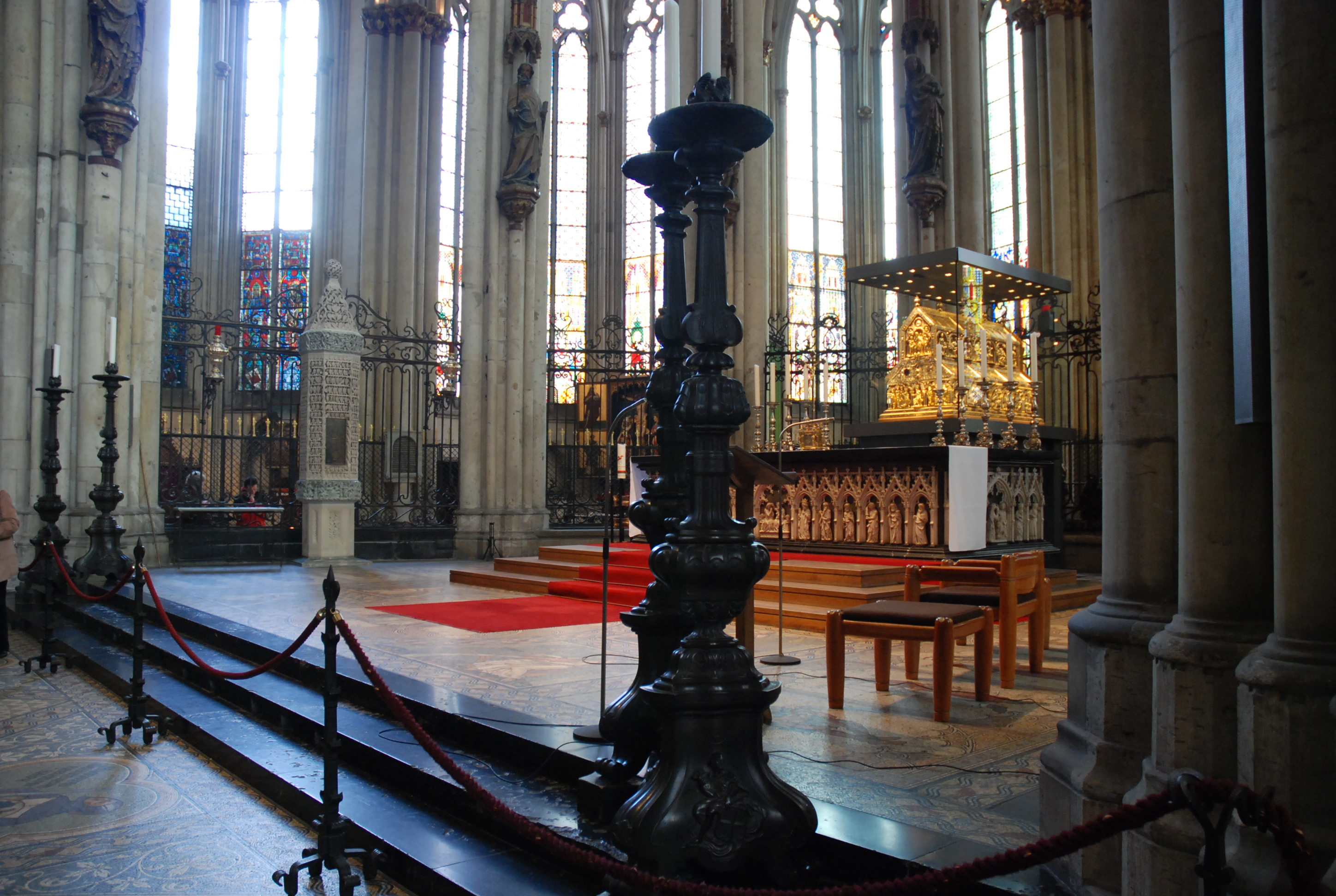 Driekoningenschrijn in de dom van Keulen (Duitsland)